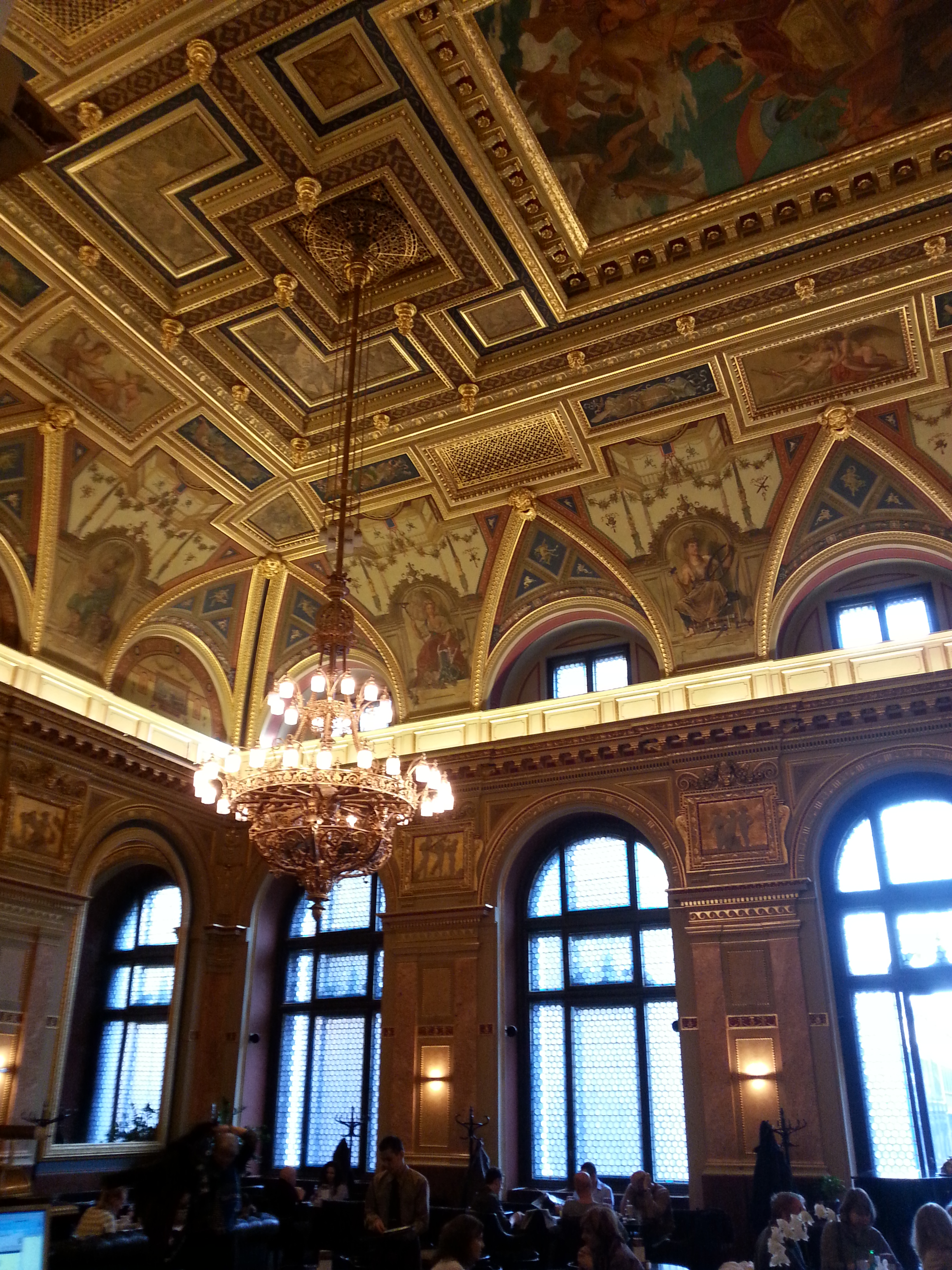 Párizsi Nagy Áruház, Lotz-terem